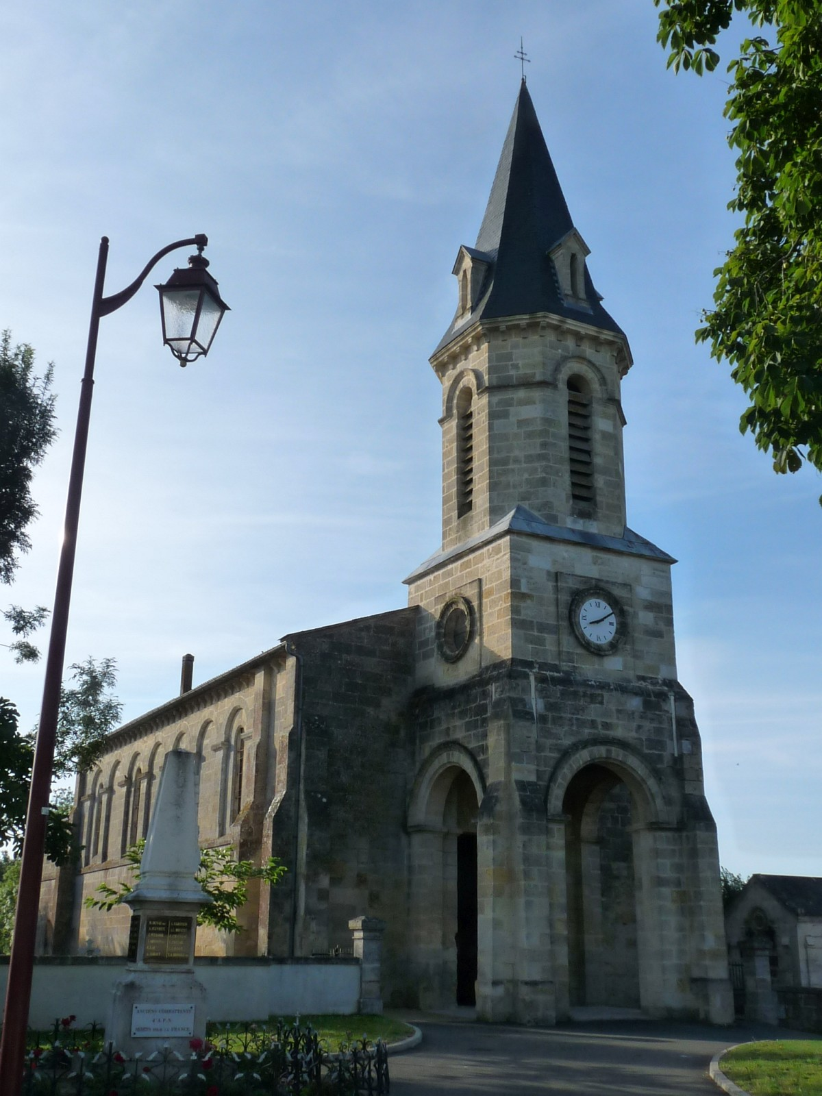 Eglise de St-Christophe-de-Double, Gironde, France